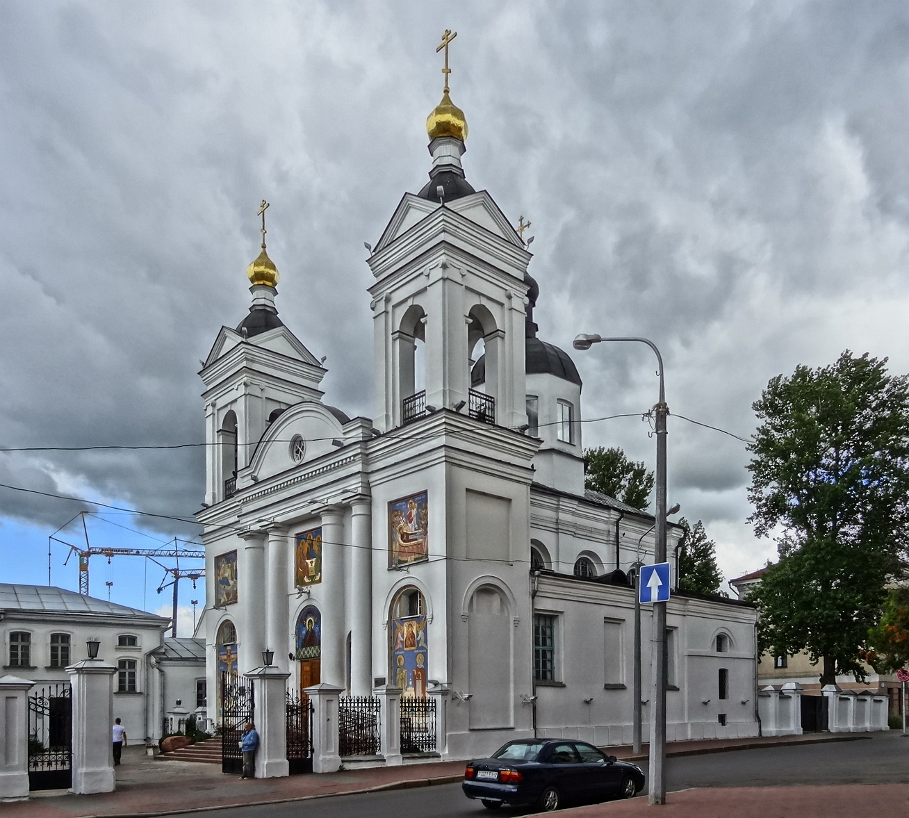 ВИТЕБСК. Покровская церковь (бывший костёл).